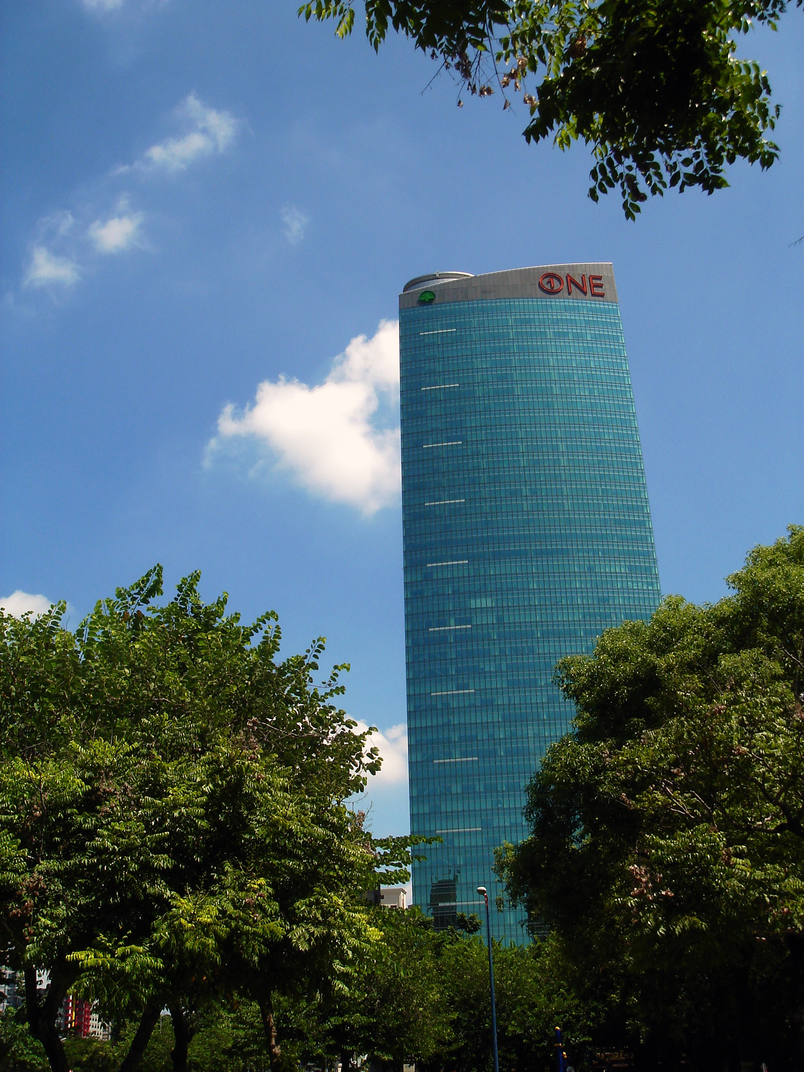 台中世華國際大樓。